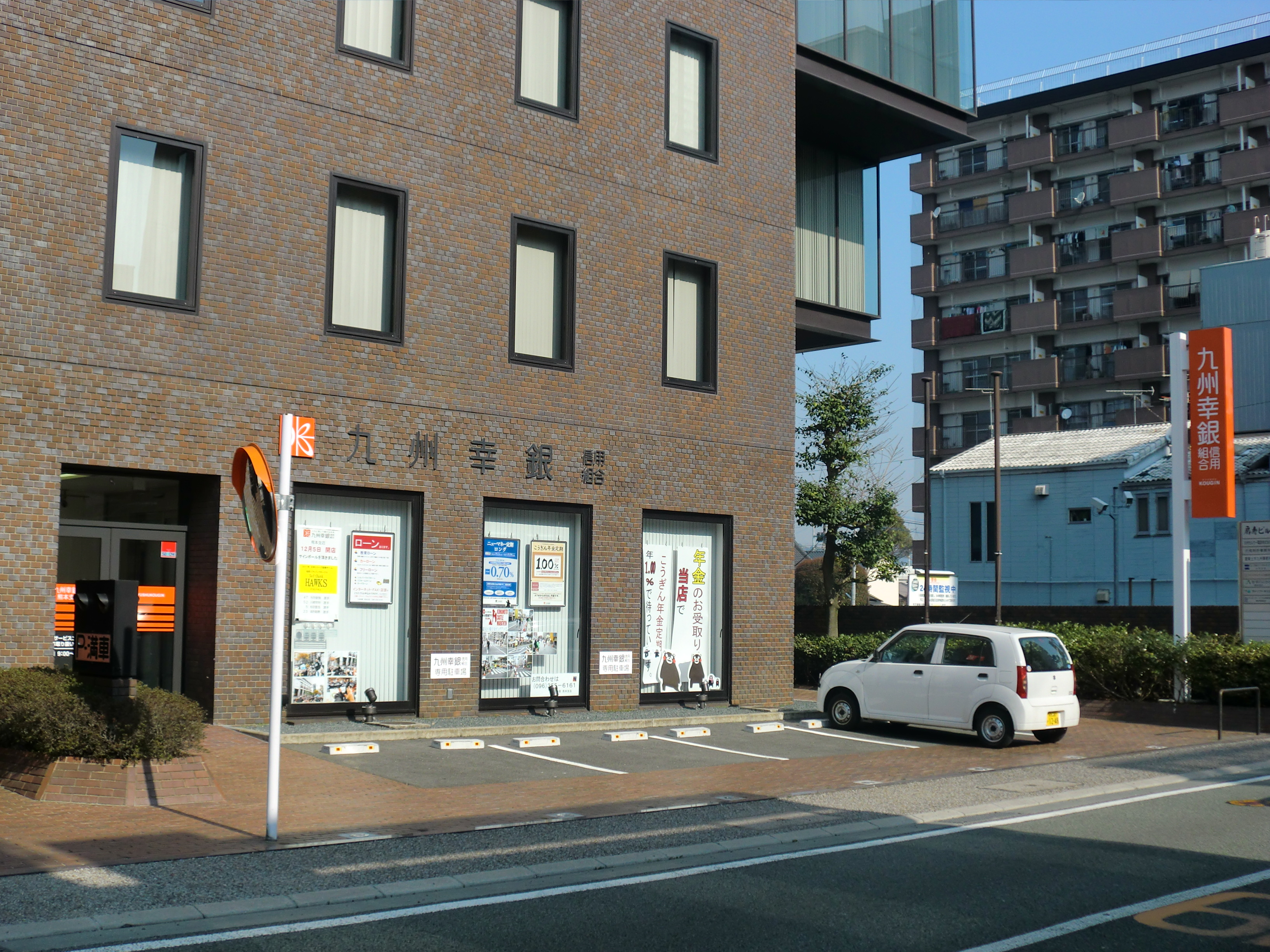 福岡市博多区にある九州幸銀（きゅうしゅうこうぎん）信用組合熊本支店